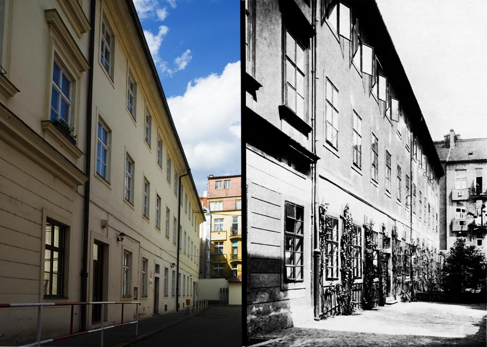 Porovnání budovy SPŠ sdělovací techniky v Panské ulici na fotografiích z roku 2006 a 1926.